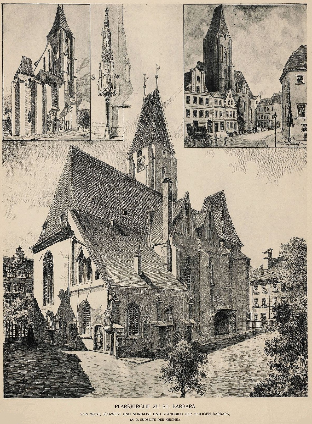 ehemalige evangelische Barbarakirche in Breslau